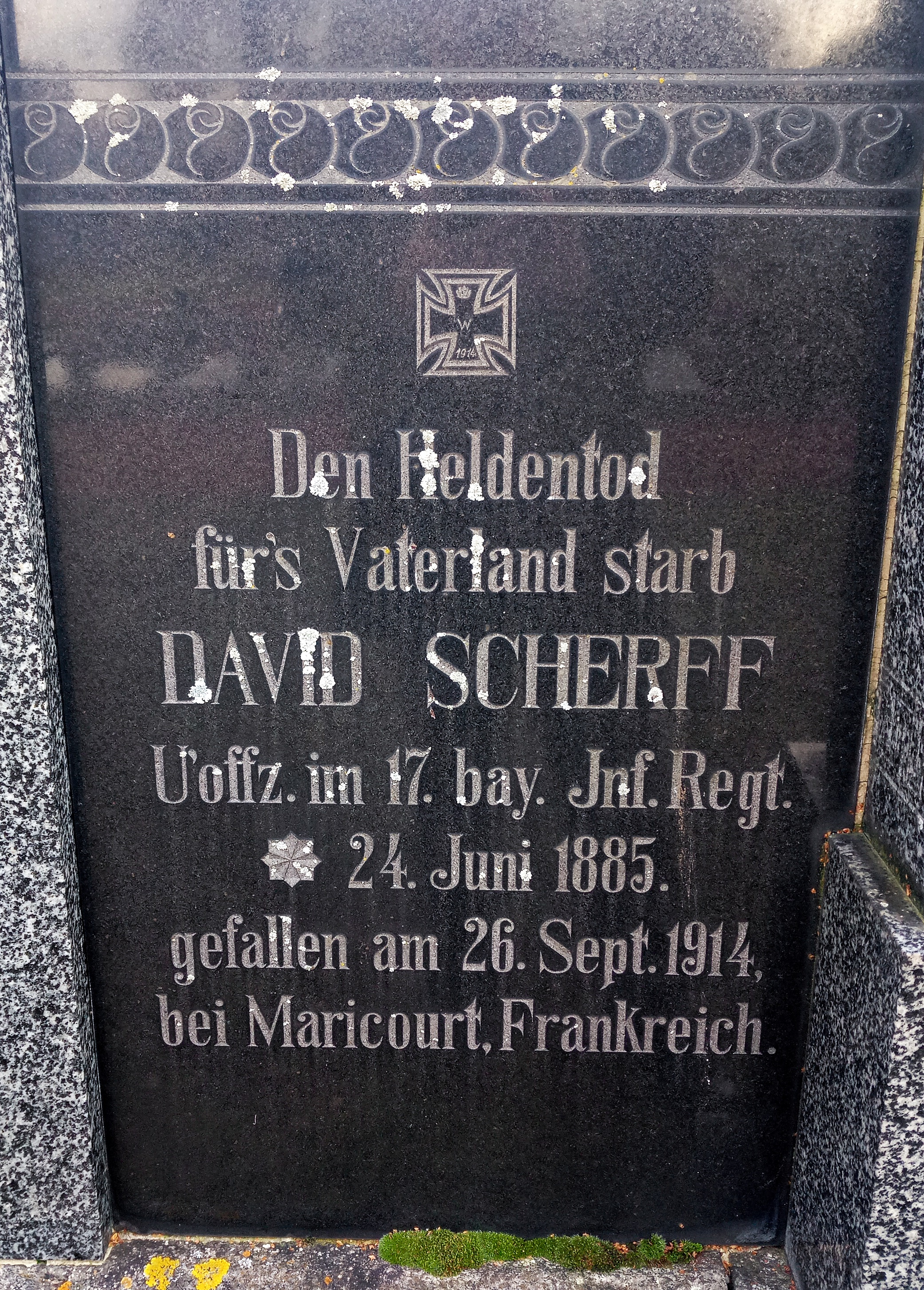 Friedhof Obersülzen; Grabstein Soldat im 17. Bay. Inf. Rgt.